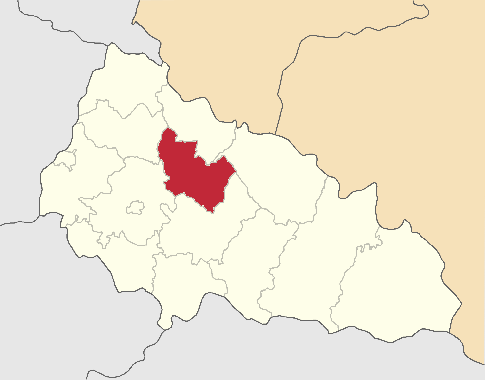 Svalyavskyi-Raion map